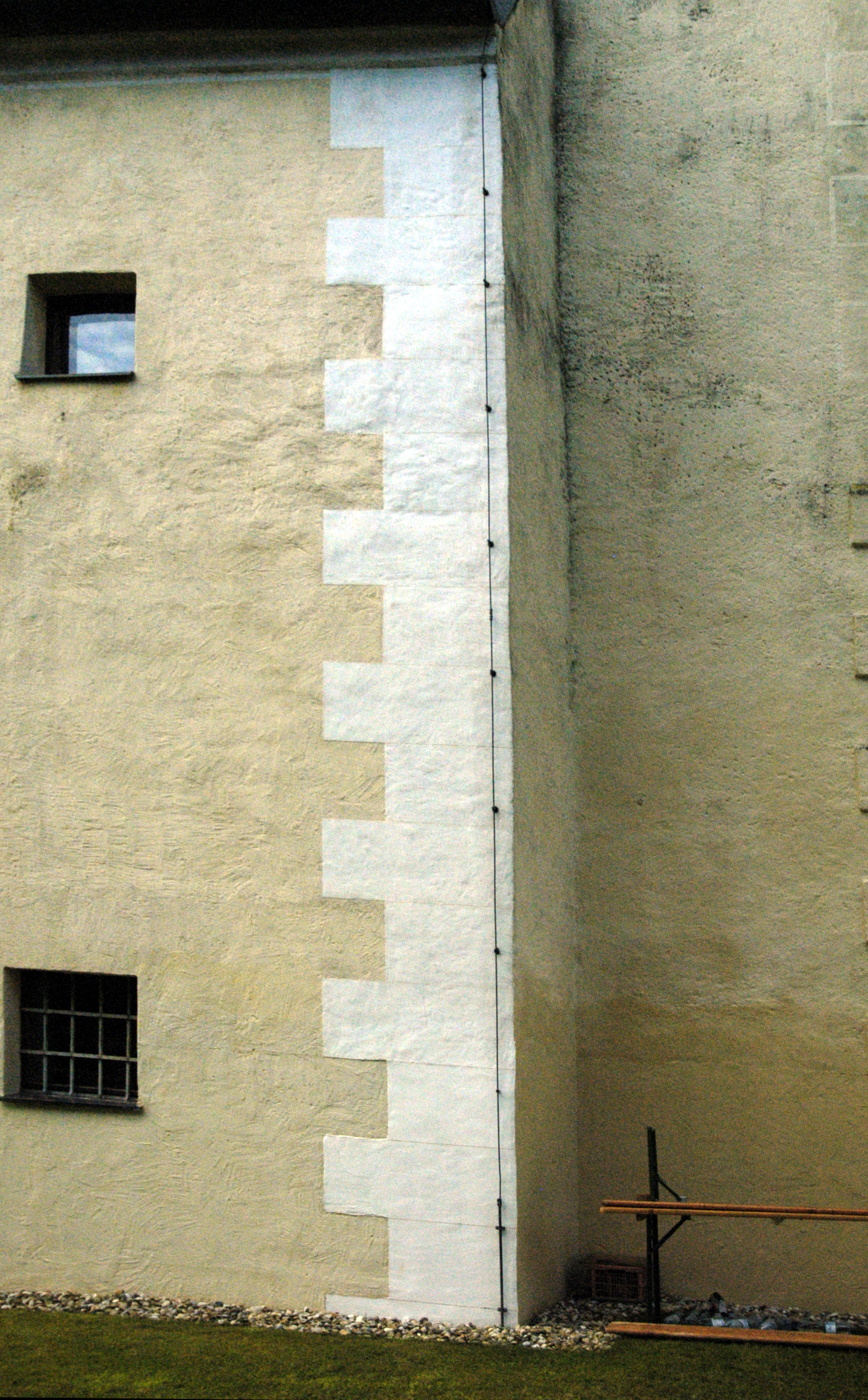 Kath. Pfarrkirche hll. Peter und Paul Ritzquader an der Nordfassade des Langhauses